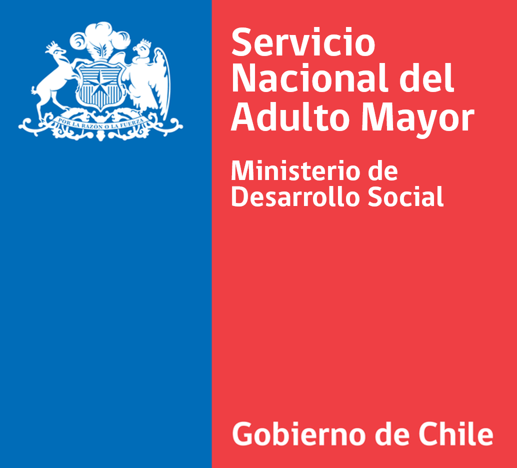 Logo Institucional del Servicio Nacional del Adulto Mayor.